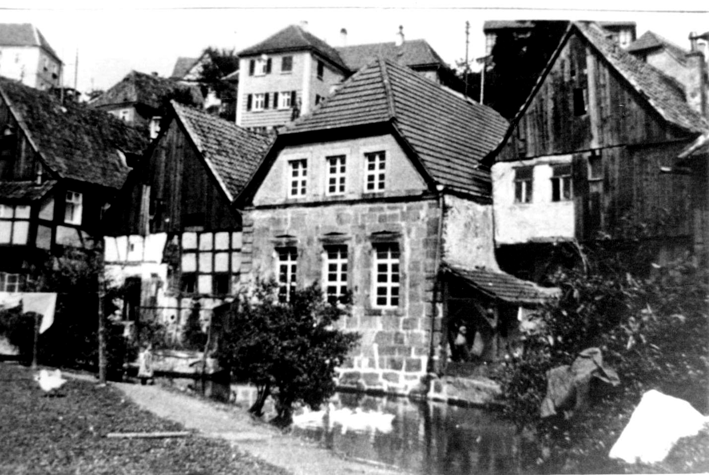 Häuserzeile am Mühlbach. Das Steingebäude in der Bildmitte ist die 1938 zerstörte Synagoge.